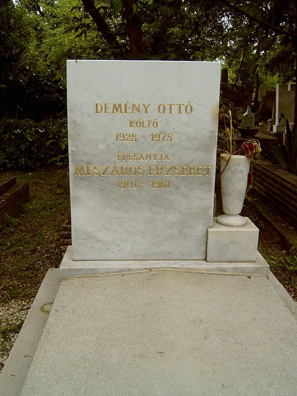 Demény Ottó (Budapest, 1928. április 5. – Budapest, 1975. december 12.) költő sírja Budapesten. Új köztemető: 74/6-1-29